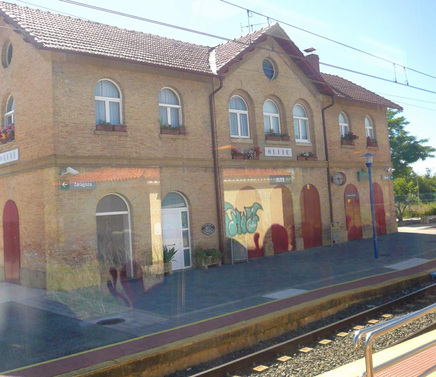 Estación de Olite (Navarra)